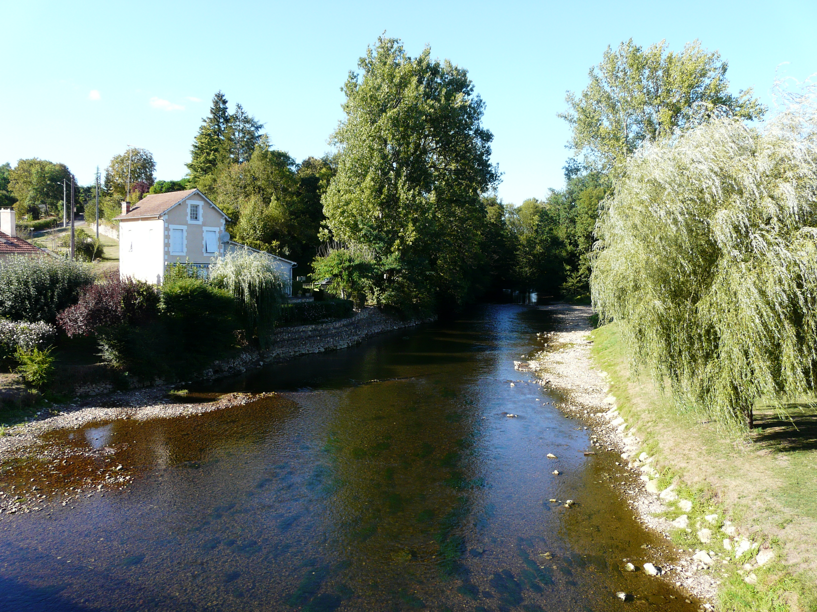 L'Isle en amont du pont de Saint-Vincent-sur-l'Isle, Dordogne, France.